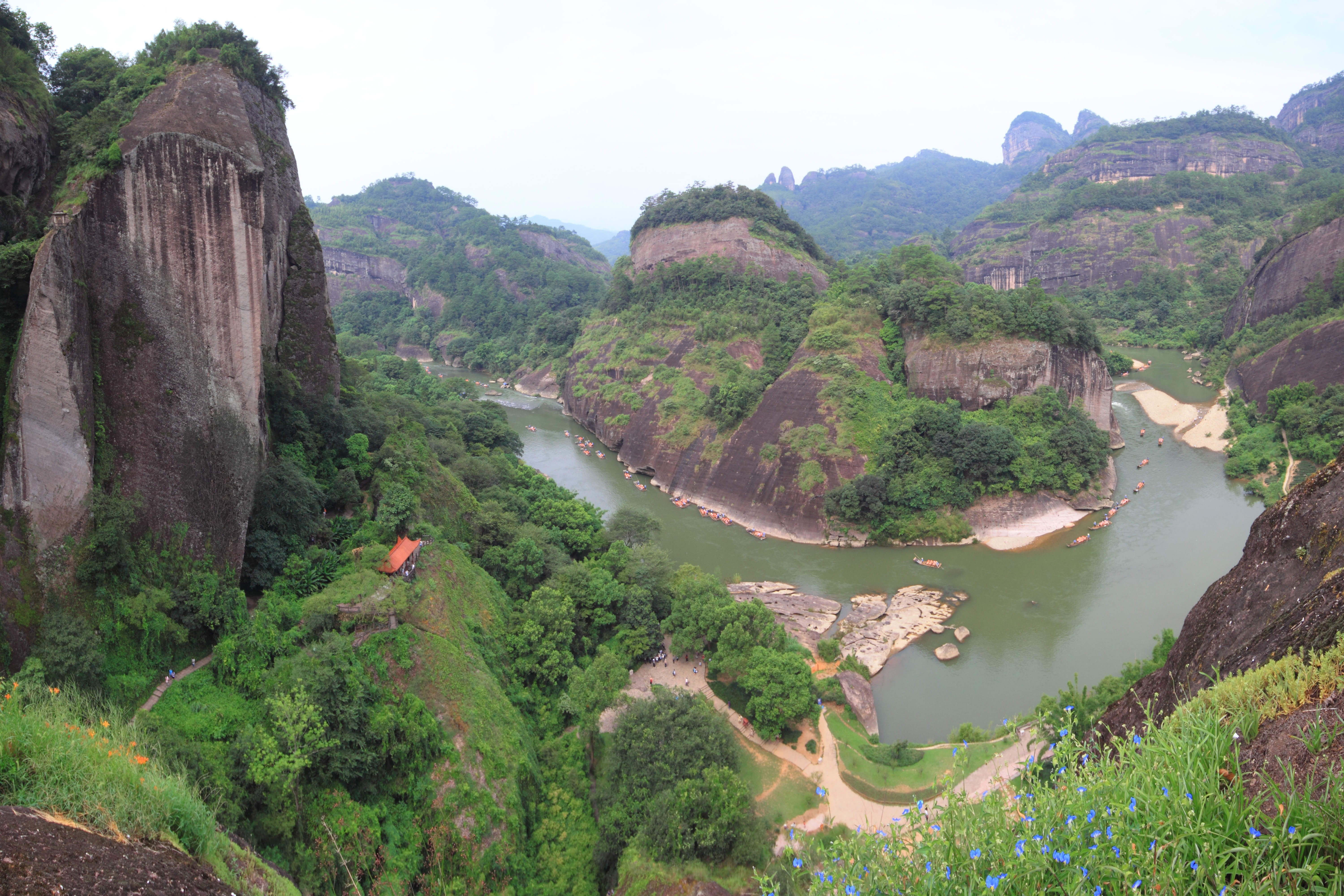 九曲溪——六曲（摄于天游峰登山道）